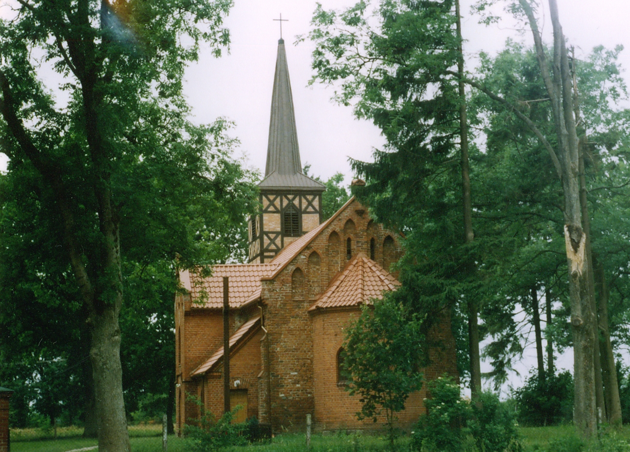 Strzelino